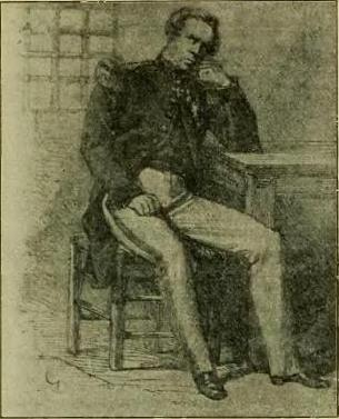 Frederico Carneiro de Campos, prisioneiro de Francisco Solano López.